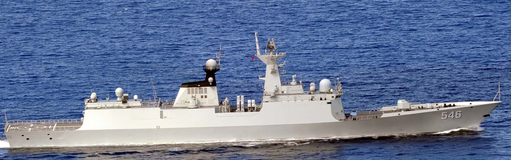 ７月２５日（木）午後７時頃、海上自衛隊第１４護衛隊「まつゆき」（舞鶴）及び第５航空群所属「Ｐ－３Ｃ」（那覇）が、宮古島の北東約１００ｋｍの海域を太平洋から東シナ海に向けて北西進する中国海軍ルージョウ級ミサイル駆逐艦２隻、ジャンカイⅡ級フリゲート２隻及びフーチン級補給艦１隻の合計５隻を確認した。 なお、当該艦艇は、７月２日（火）、対馬海峡を北上、７月１４日（日）、宗谷海峡を東航した後、７月１８日（木）、聟島（東京都小笠原村）の北海域を南西進したことを確認している。その後、聟島西約２７０ｋｍの海域で陣形運動を、沖ノ鳥島北約４００ｋｍの海域で洋上補給を実施しているのを確認した。